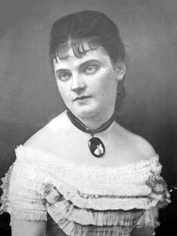 Grafaitė Marija Skuževska Oginskienė - kunigaikščio Mykolo Mikalojus Oginskio (1849-1902), žmona, jaunystėje Austrijos imperatoriaus freilina. Plungės dvare įsteigė našlaičių prieglaudą.